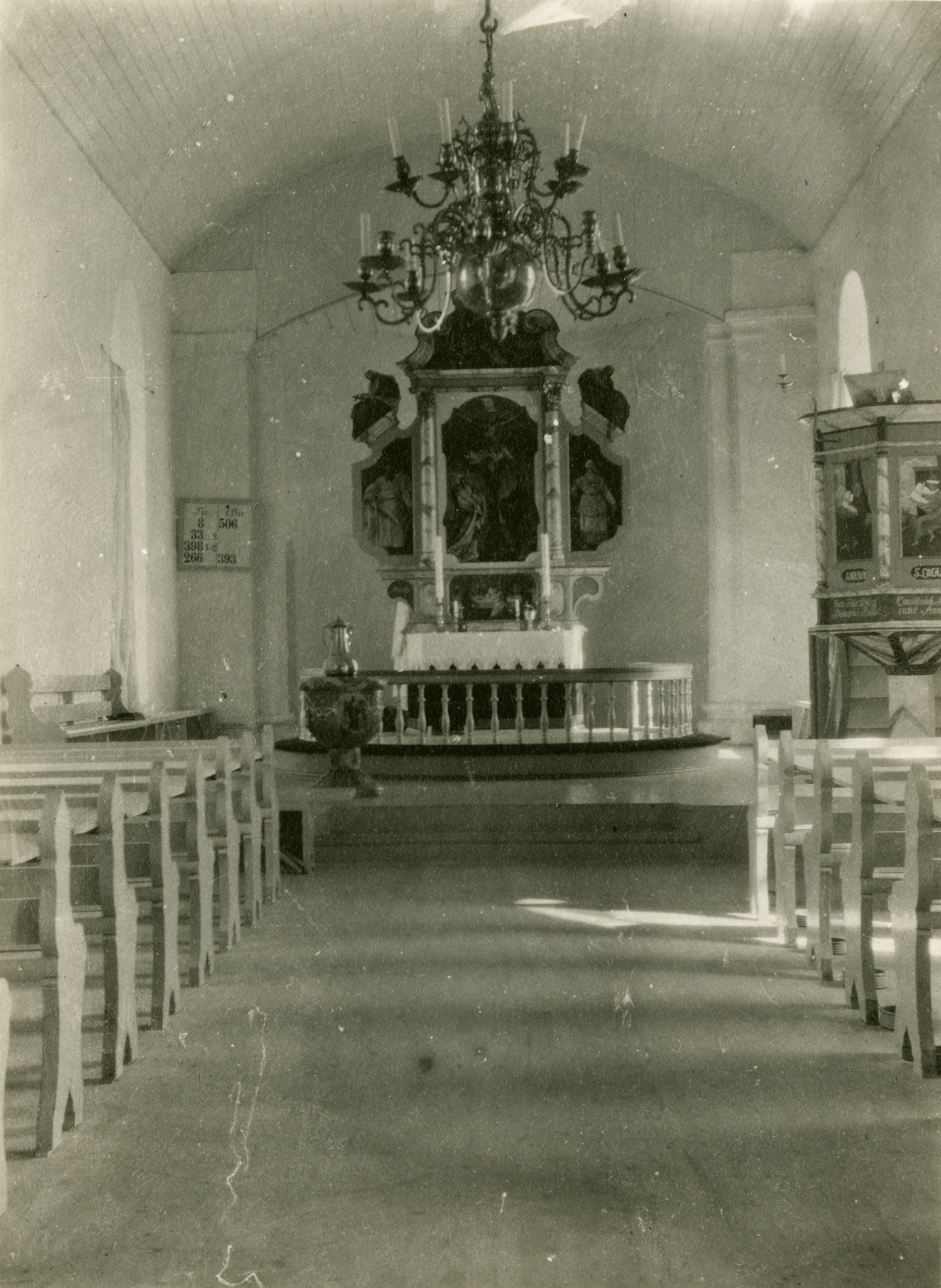 Herøy kirke i Herøy, Nordland